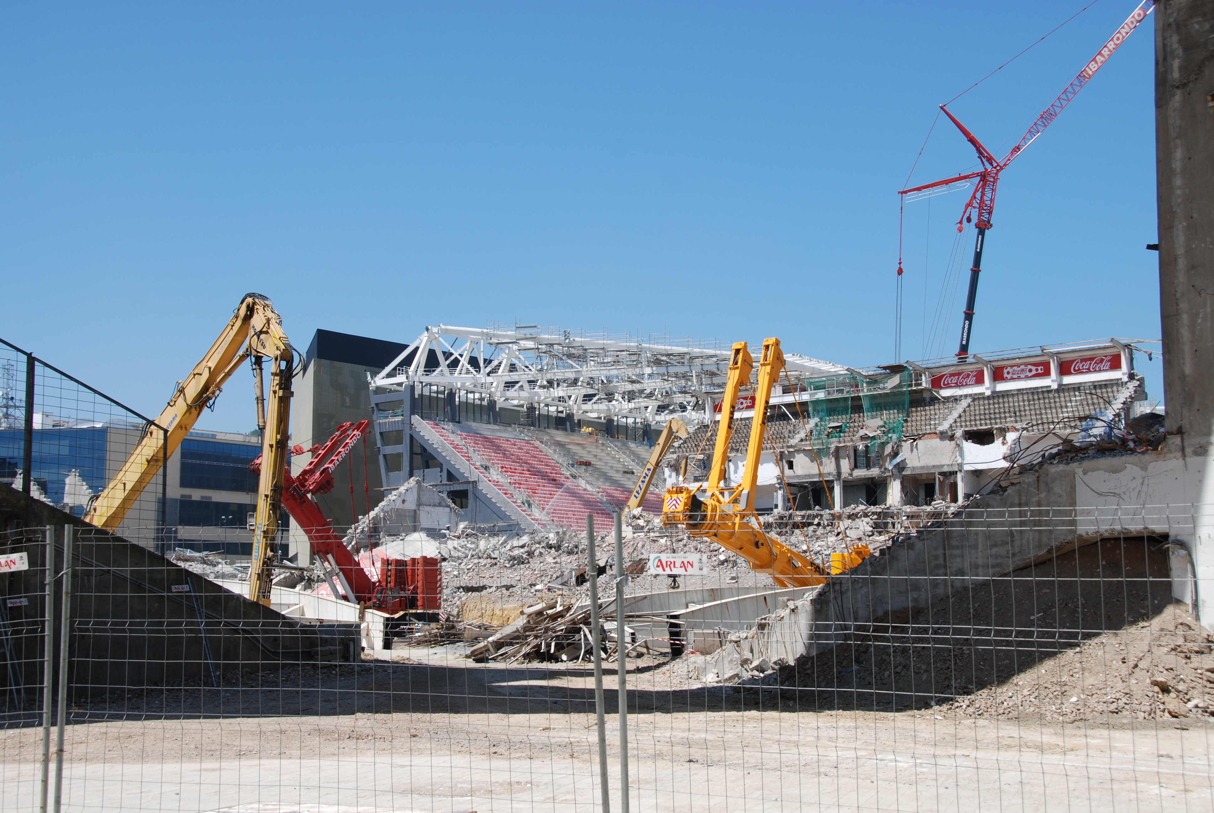 Enderroc de San Mamés